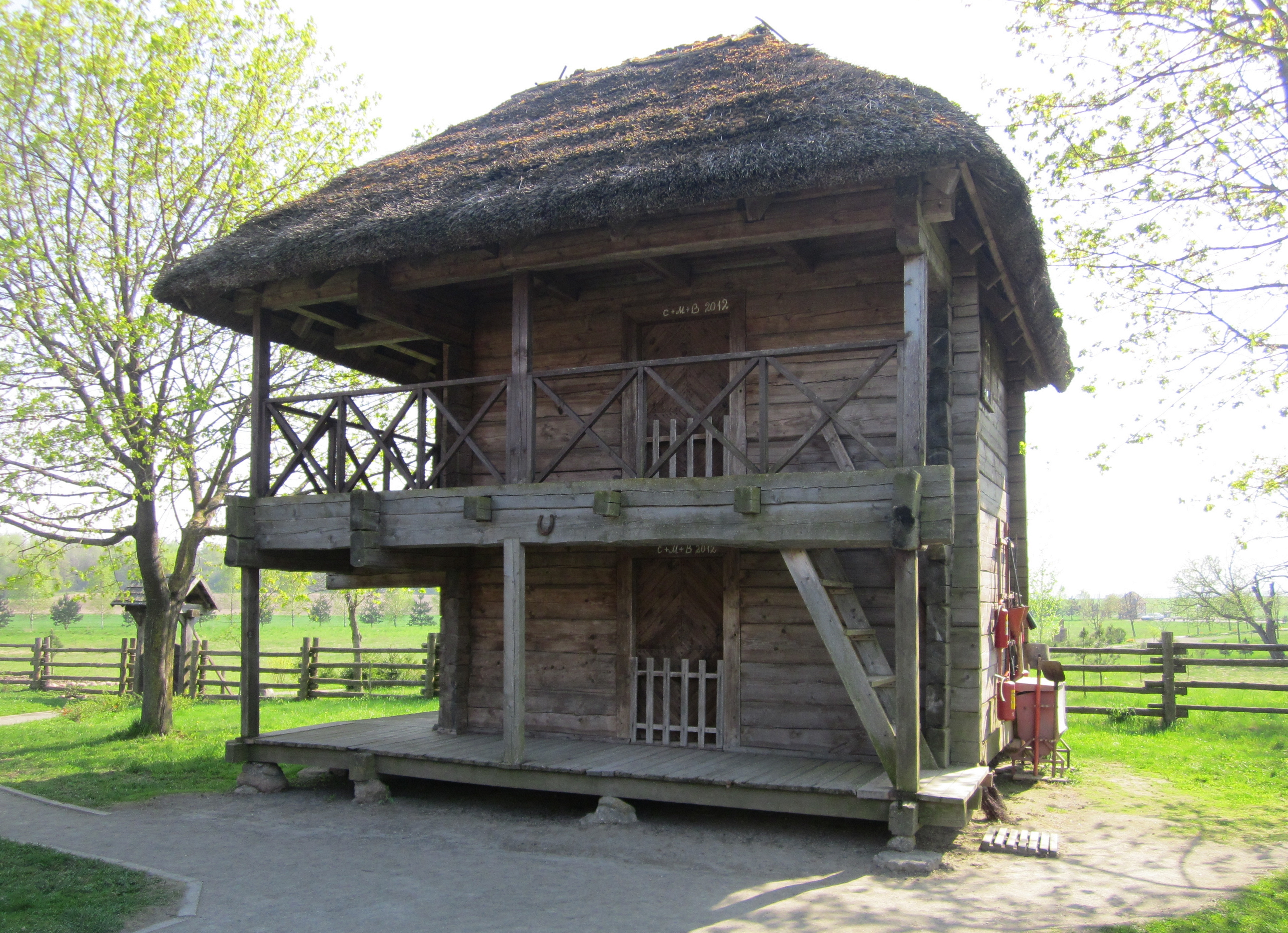 Беларуская (тарашкевіца): Сядзіба-мэмарыял А. Міцкевіча. хутар Завосьсе This is a photo of Belarusian heritage monument. Reference number: 113Г000056 ( WLM)